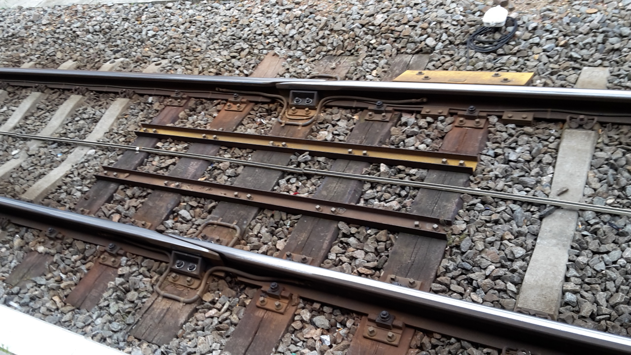 schuine voeg in voegloos spoor, zodat de spoorstaven kunnen uitzetten.